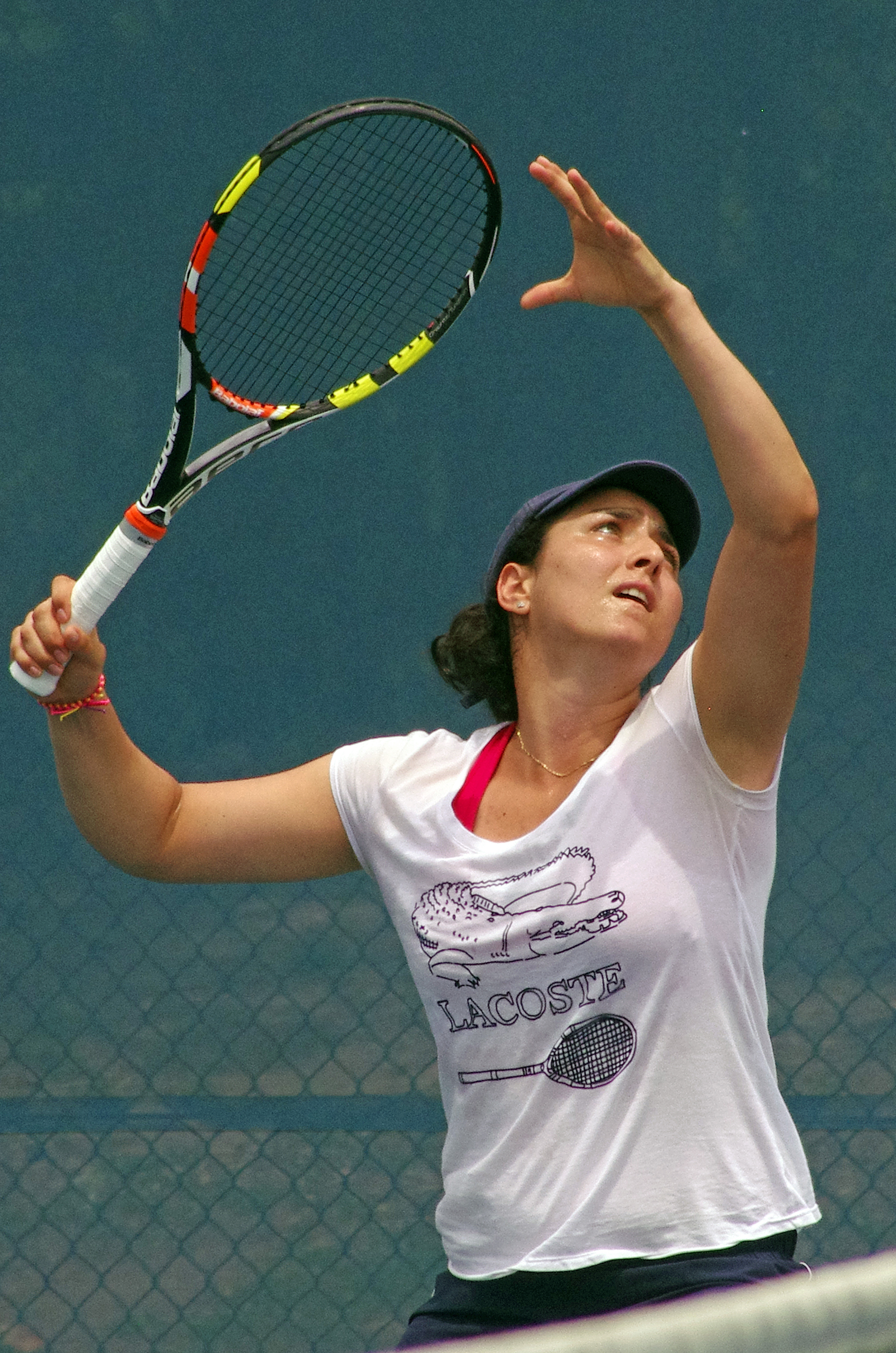 ONS JABEUR